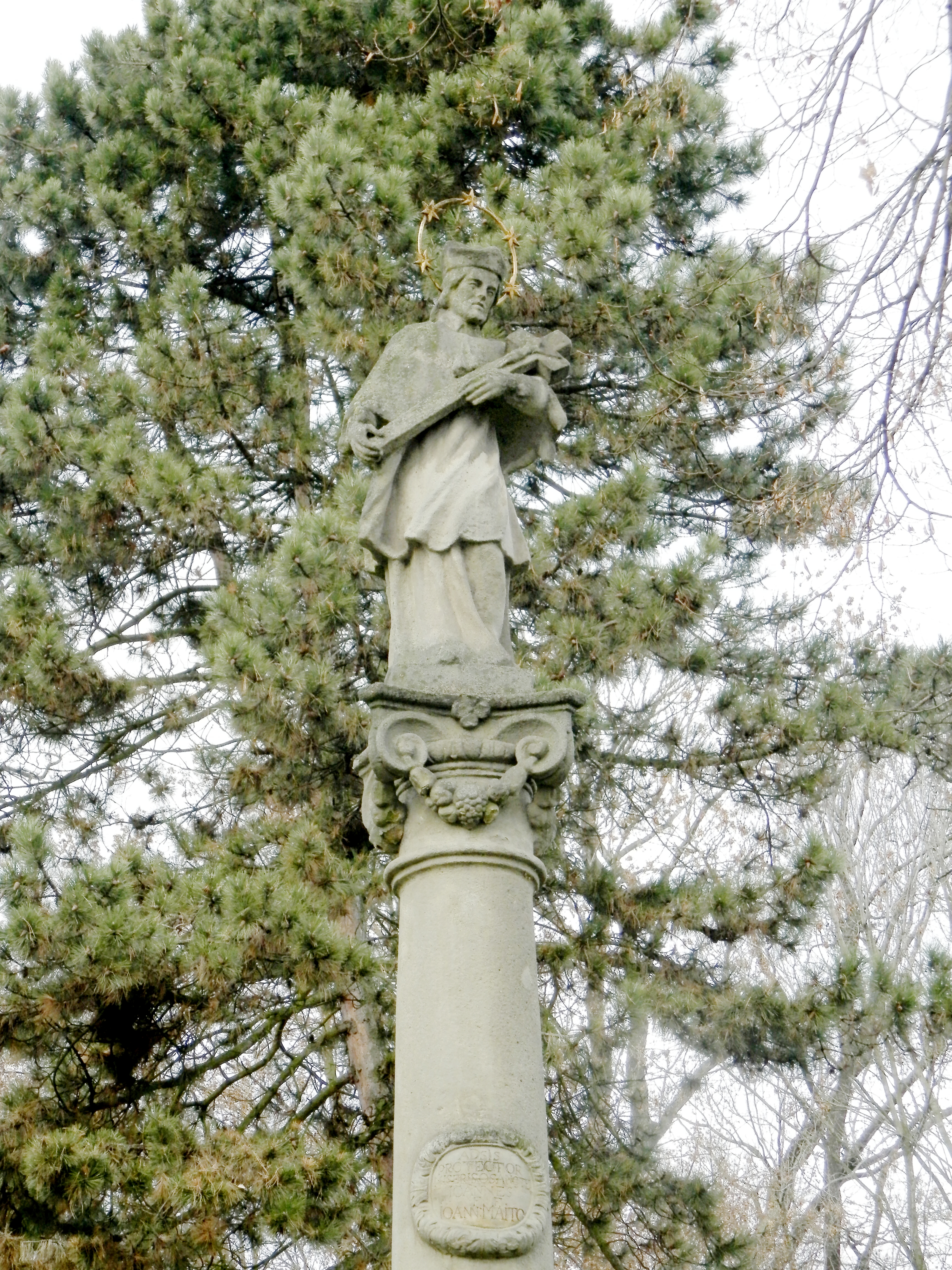 Sloup se sochou sv. Jana Nepomuckého Kroměříž, Vejvanovského